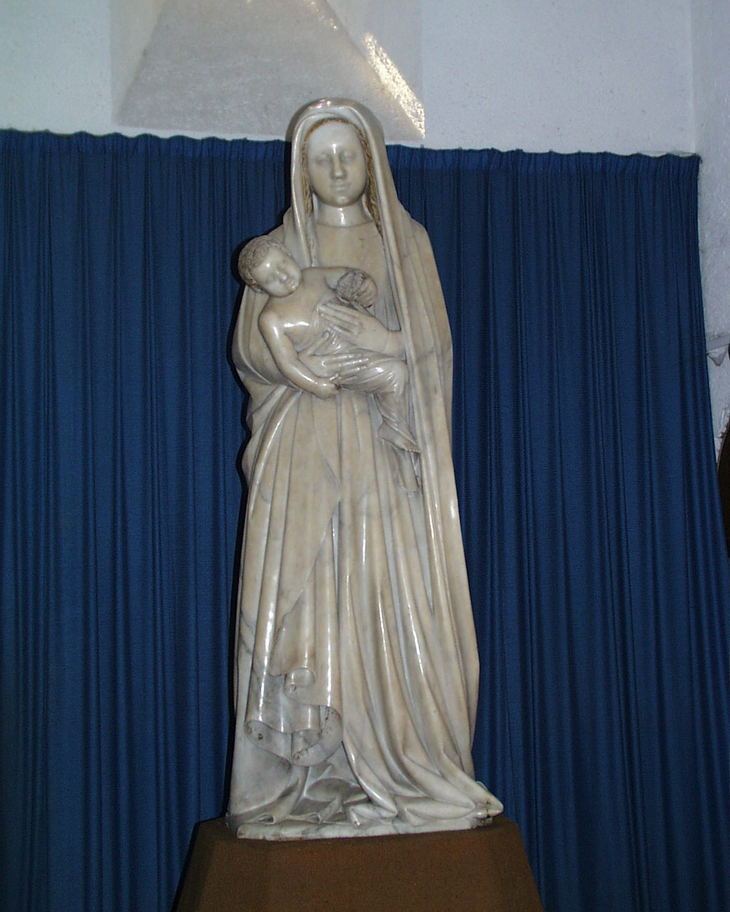 Photographie de la Vierge en marbre de Carrare de l'église Sainte-Madeleine de Marcoussis (Essonne) prise par Utilisateur:Belgavox en Septembre fr:1999